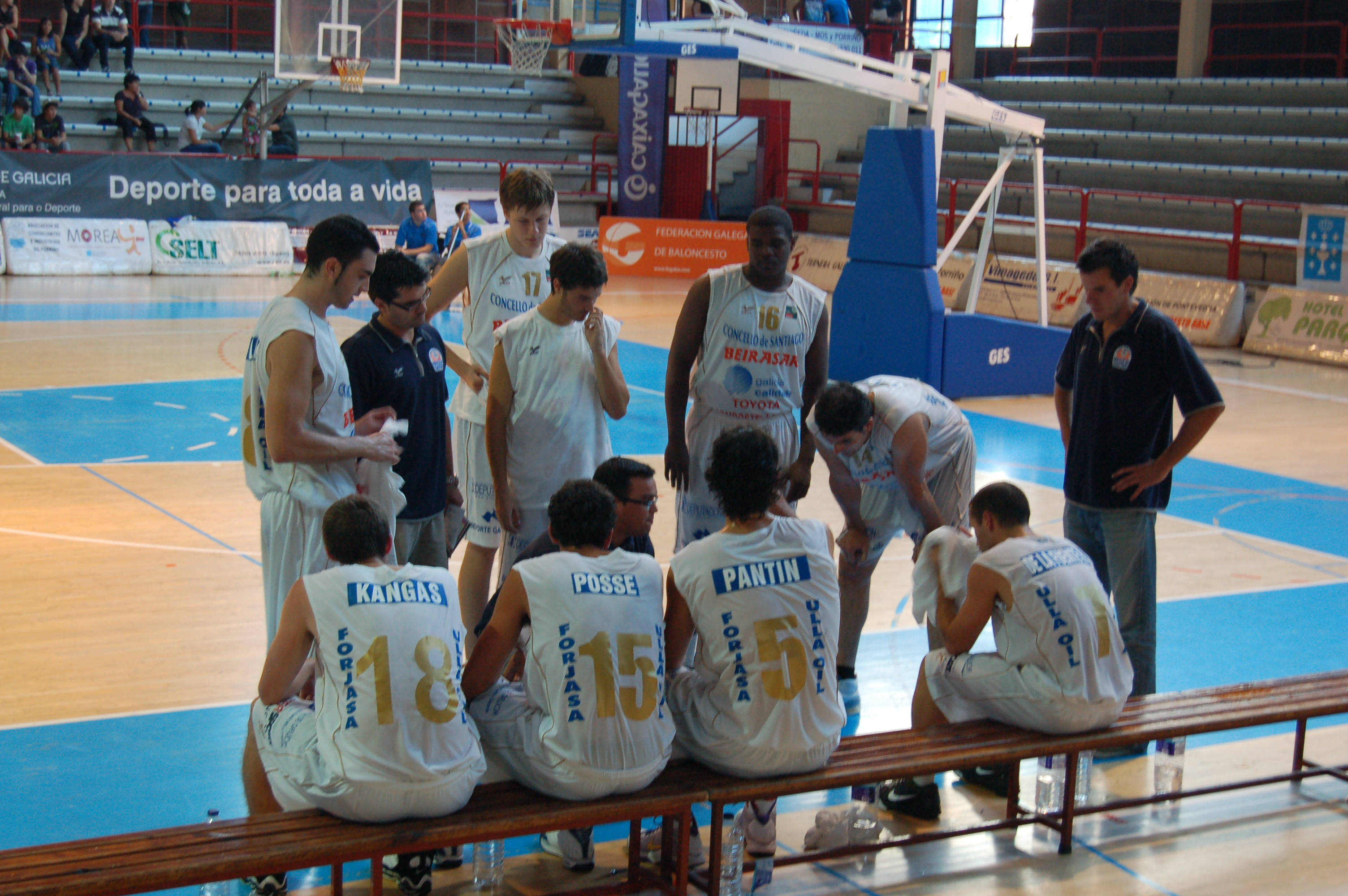 Xogadores do Club Baloncesto Rosalía de Castro recibindo instrucións do adestrador na semifinal da Copa Galicia 2009, disputada no Porriño o 26 de setembro contra o Club Baloncesto Breogán.